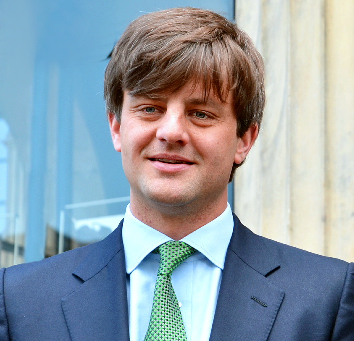 Ernst August Prinz von Hanover auf dem Weg in das Opernhaus in Hannover zur Festveranstaltung anlässlich der Eröffnung der Niedersächsischen Landesausstellung 2014 unter dem Titel Als die Royals aus Hannover kamen ...